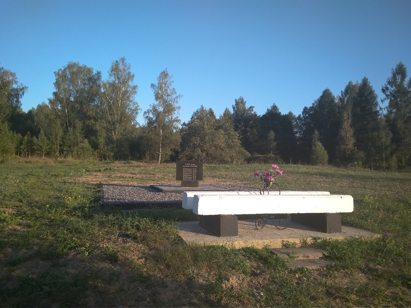 Символическая скамейка в д. Литавец